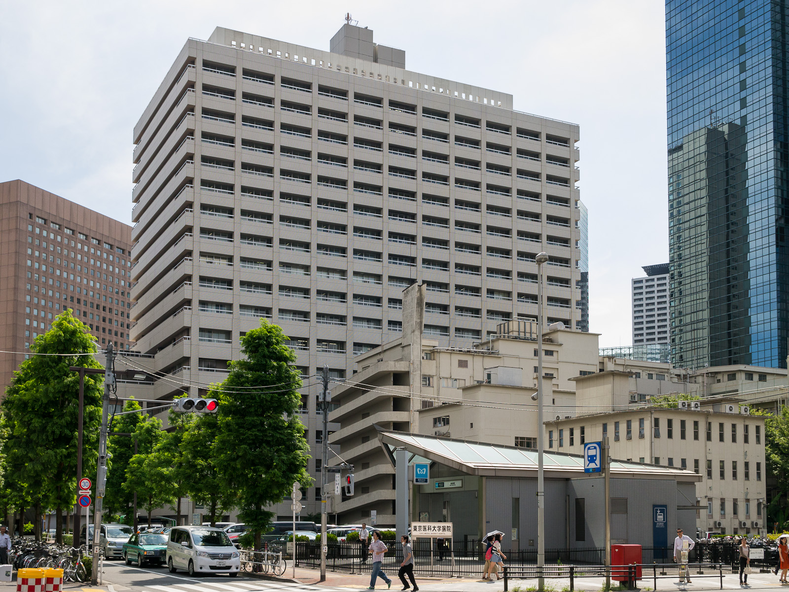 東京医科大学病院、東京都新宿区西新宿。青梅街道・西新宿駅前方面より。